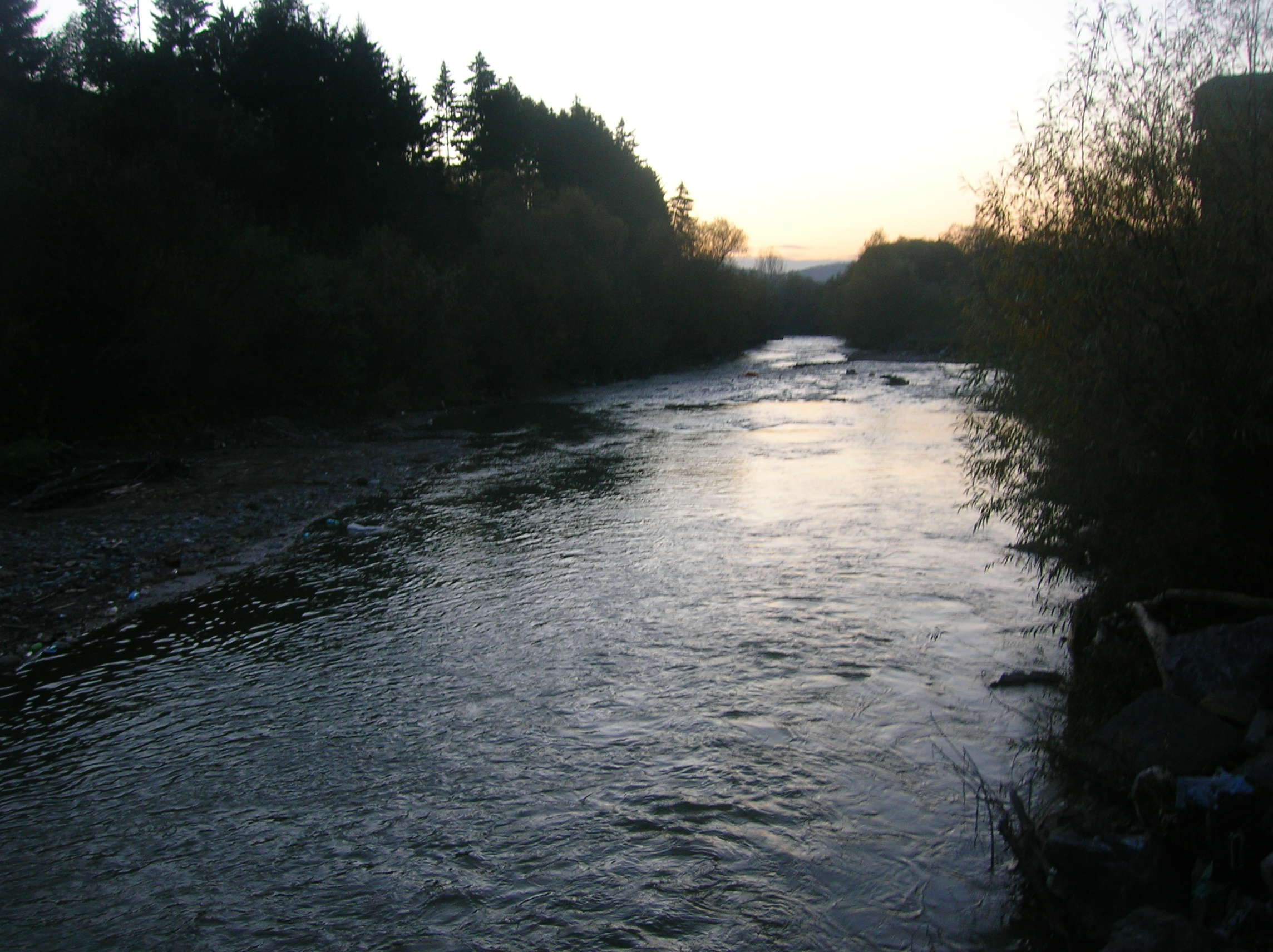 Raul Viseu, Moisei, apus